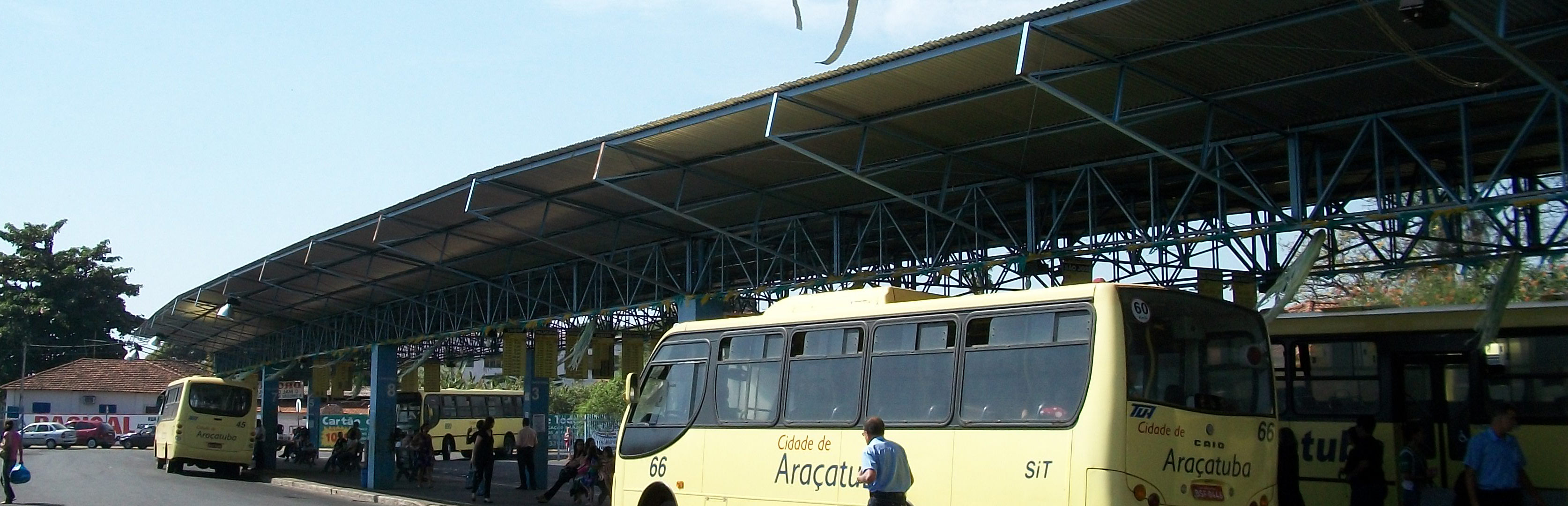 Terminal de ônibus no centro de Araçatuba, São Paulo, Brasil.